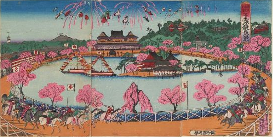 歌川国利 上野不忍池競馬の全体図